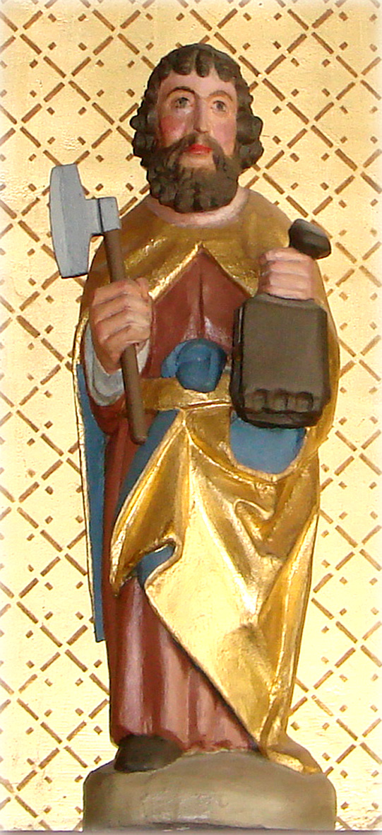 Sct Mathias m Posebog Malling Kirke Jylland, Denmark